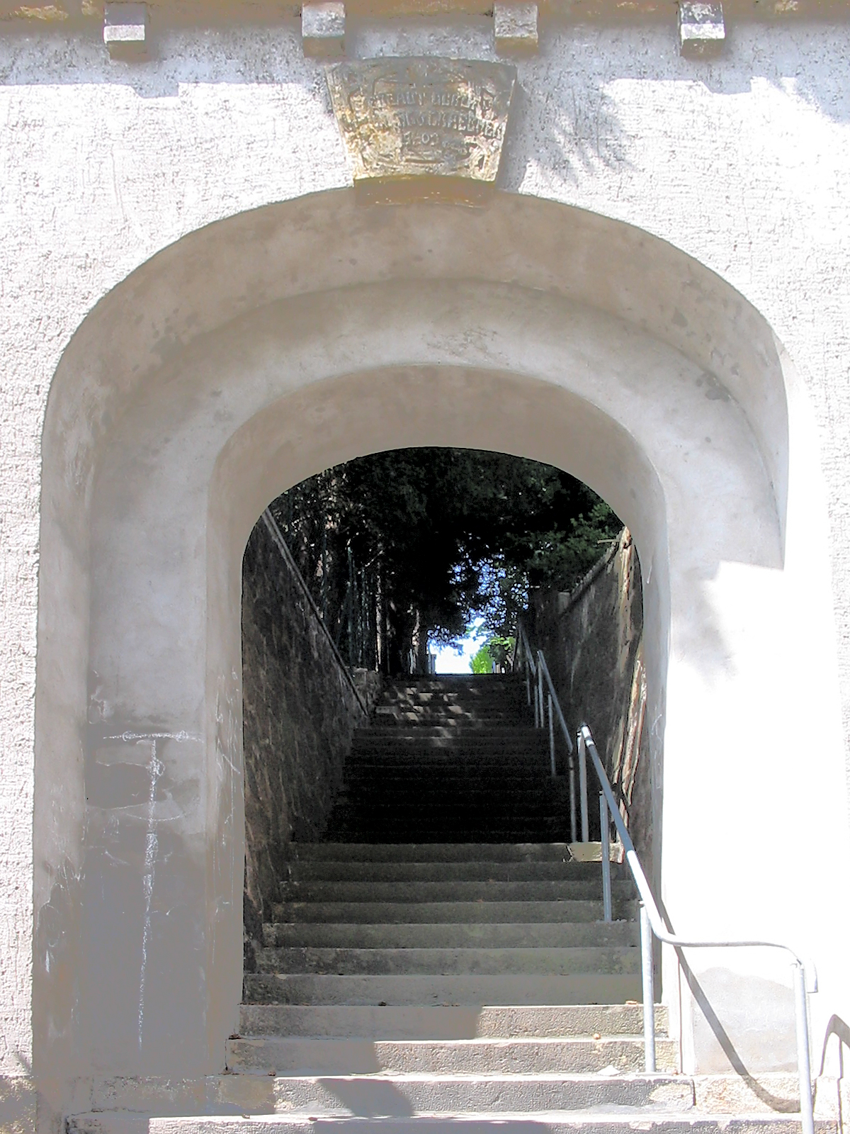 Radebeul, Villenkolonie Altfriedstein, Durchgang zur Treppenverbindung Altfriedstein, im Bogen der Schlussstein von 1903